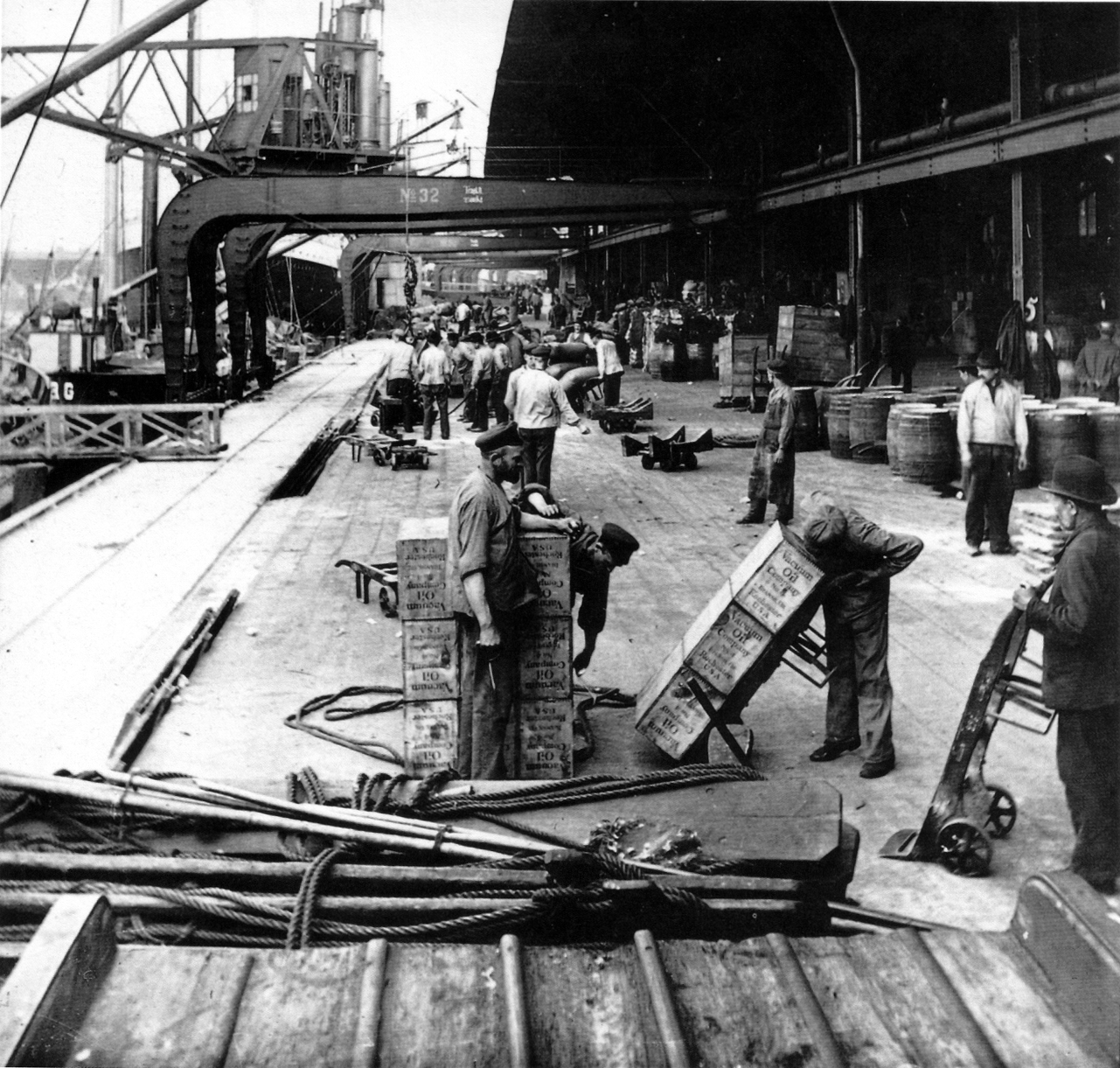 Kaiarbeiter im Hamburger Hafen um 1900. Stückgut wird mit Sackkarren transportiert.